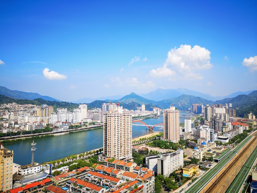 Une photo de Qingtian prise du haut d'un gratte-ciel